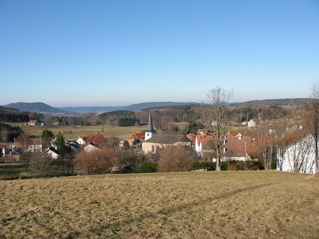 Gerbépal Commune des Vosges Panorama en direction de Corcieux Copyright © Christian Amet